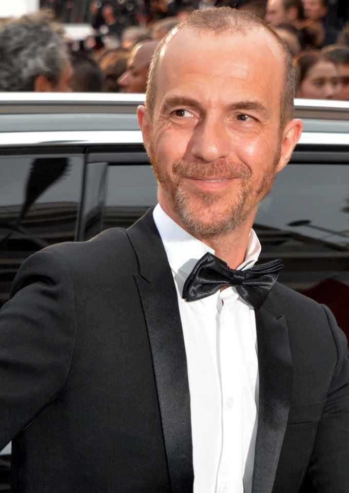 Calogero au Festival de Cannes 2019.